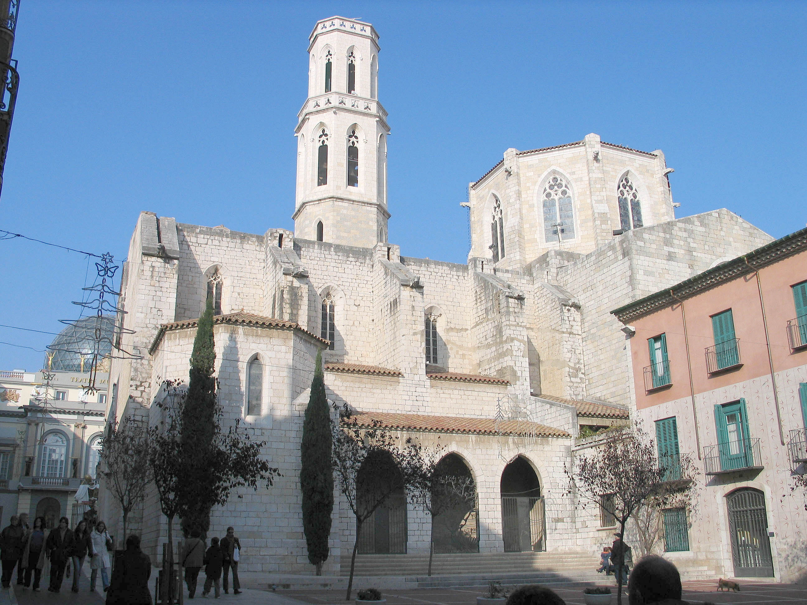 Église San Pere, à Figuères (province de Gérone, Catalogne, Espagne).